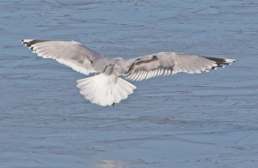 Linnun siipi.